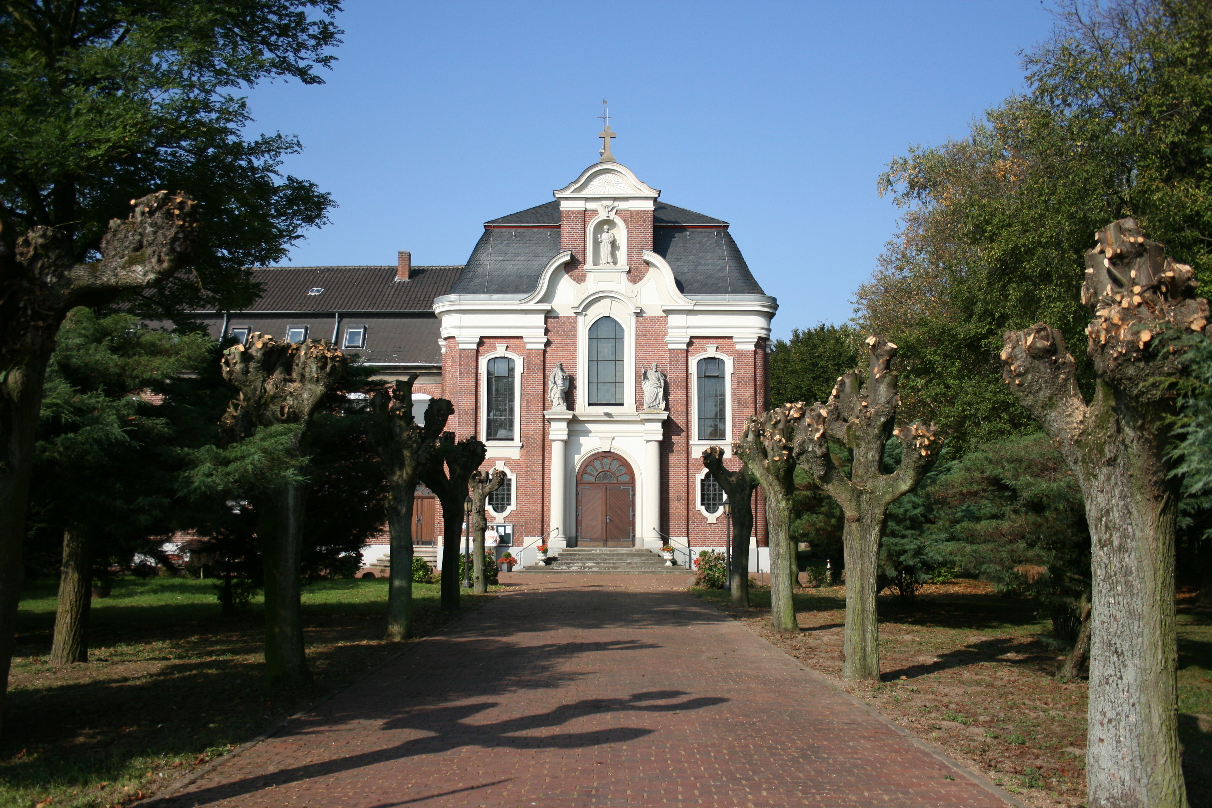 Kloster Mörmter in Xanten-Mörmter